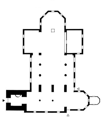 Dies ist der Grundriss der Kirche in Mutscheid, Bad Münstereifel.